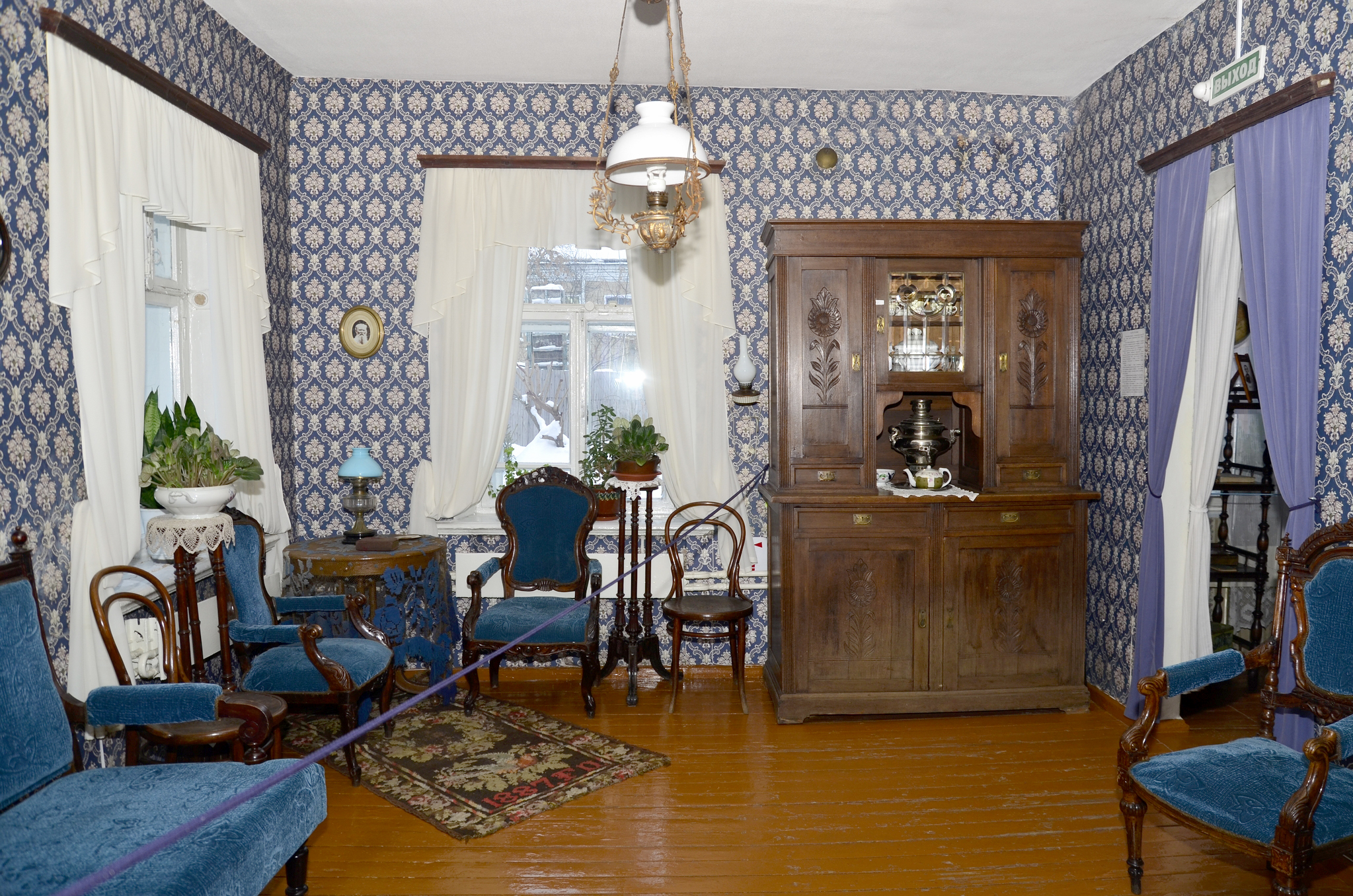 Интерьер музея Грина, Киров